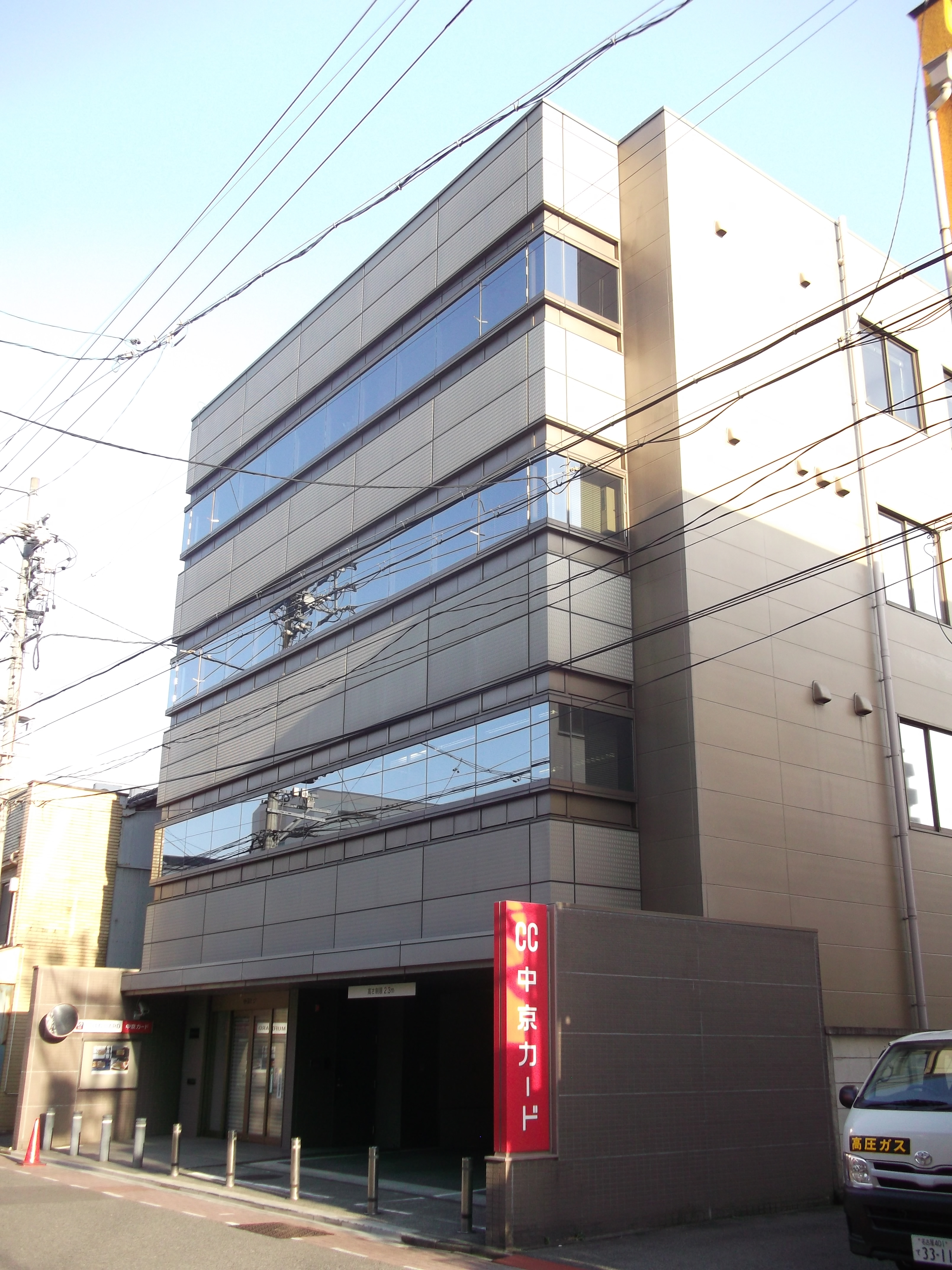 名古屋市東区の中京カード本社を北側公道西側より撮影